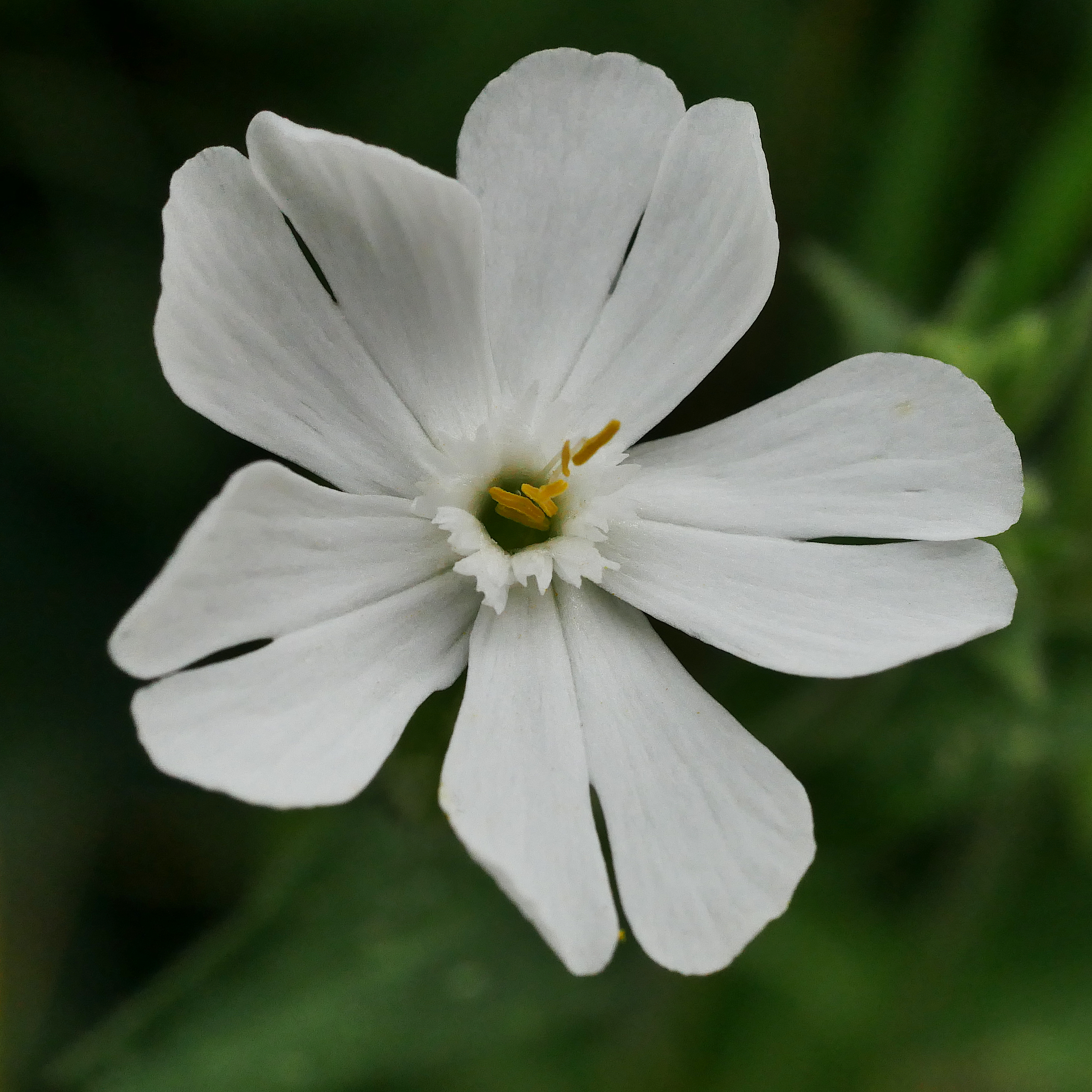 Weiße Lichtnelke (Silene latifolia) im Freilichtmuseum Roscheider Hof. Standort: zwischen Asphaltsträßchen und Hecke auf der Höhe des Bauerngartens zwischen Haus Molz und Haus Kläsjes.